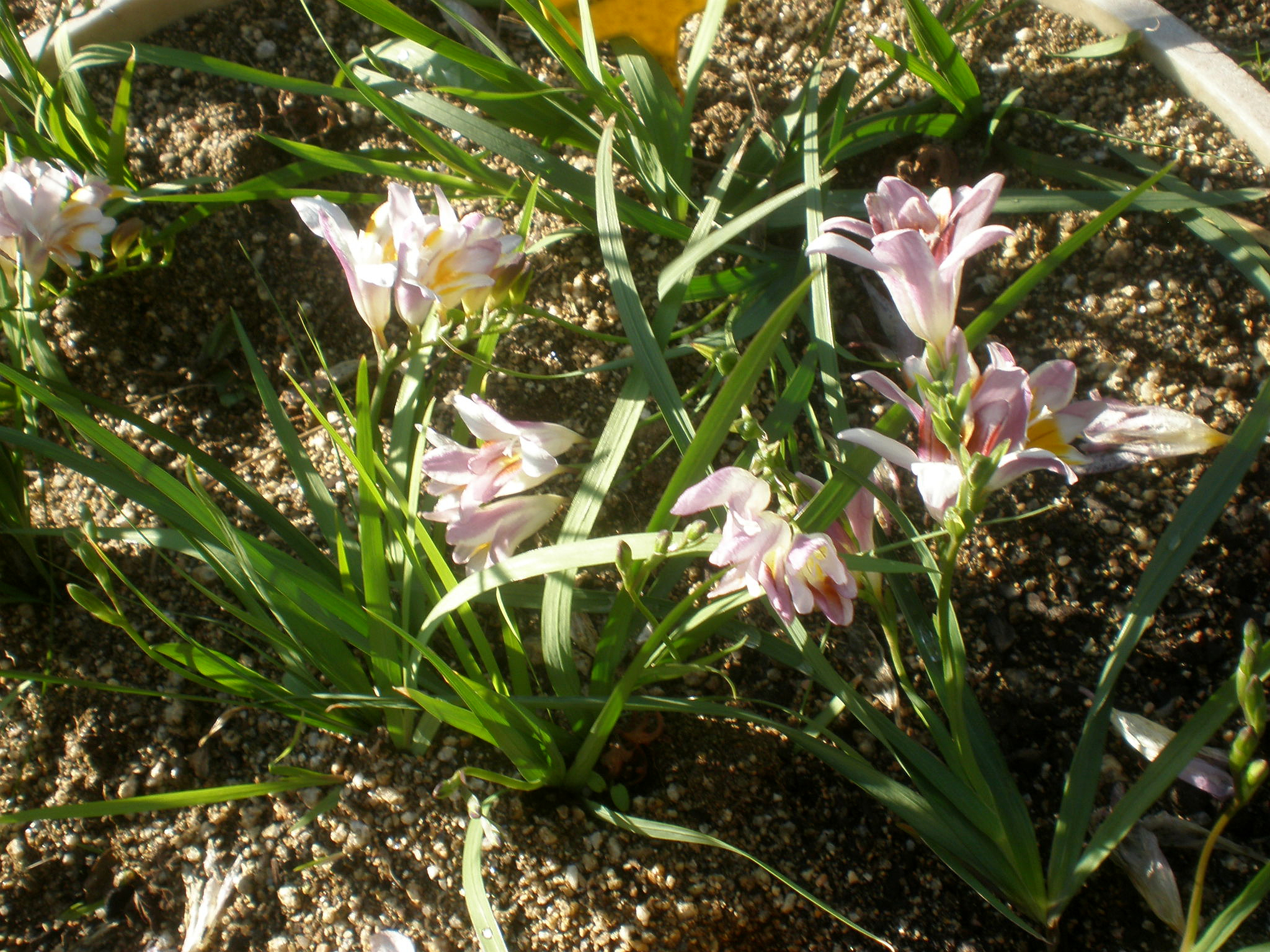 Jardín Botánico de Barcelona.